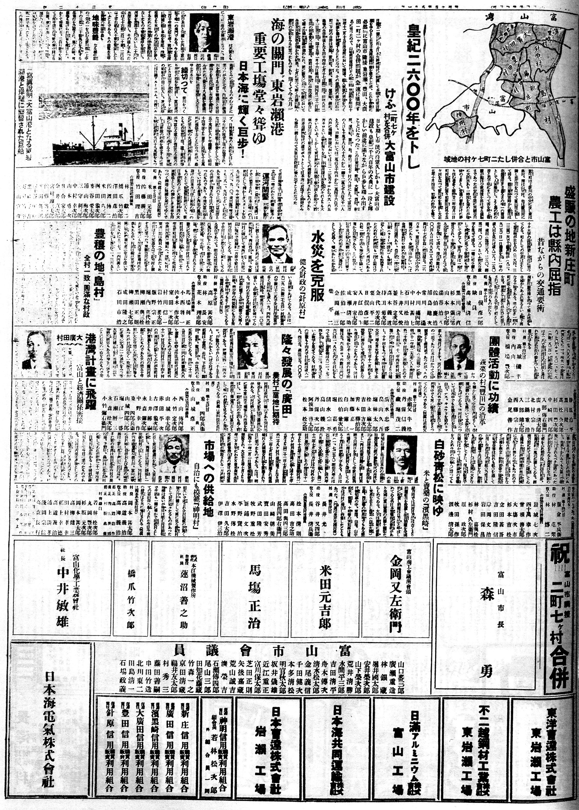 1940年（昭和15年）9月1日より上新川郡浜黒崎村、東岩瀬町、大広田村、針原村、豊田村、広田村、新庄町、島村及び婦負郡神明村が富山市に合併される旨を報ずる新聞記事